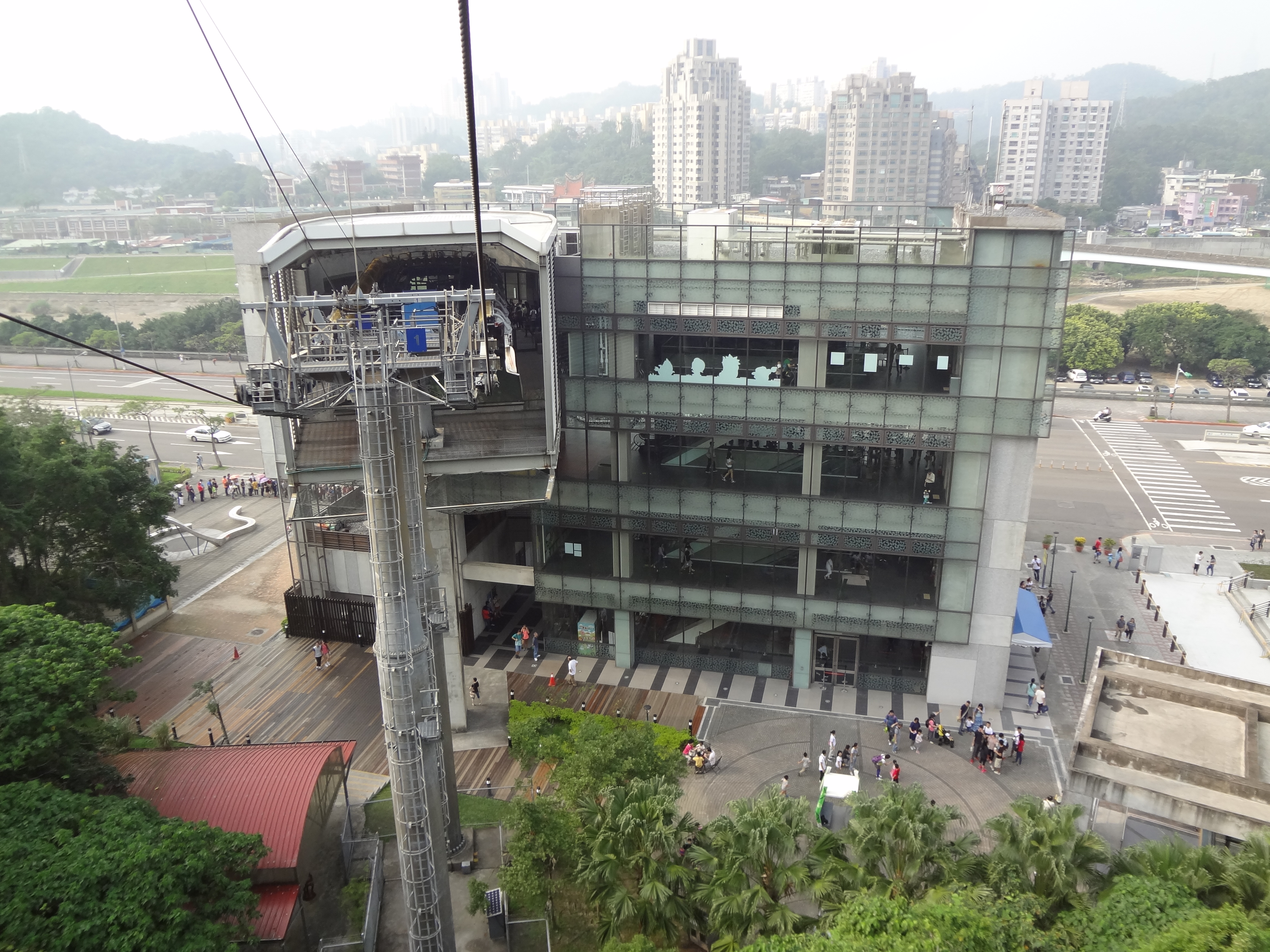 貓空纜車動物園站後方外觀與貓空纜車第1號塔柱。